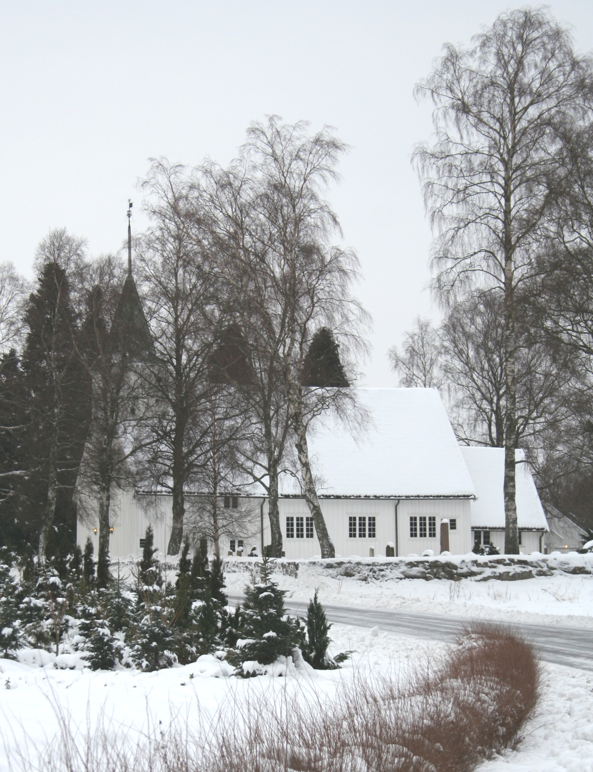 Søgne gamle kirke